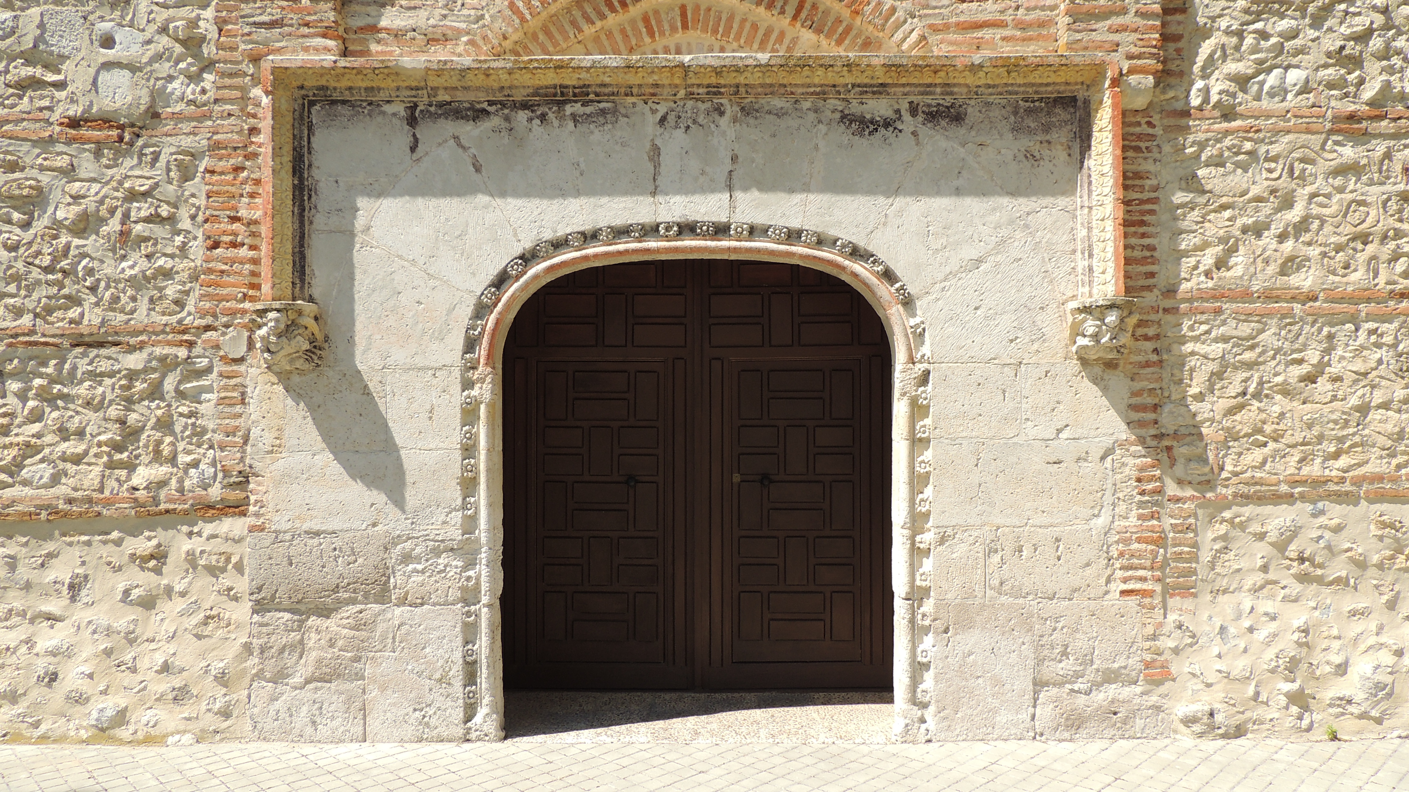 Portada